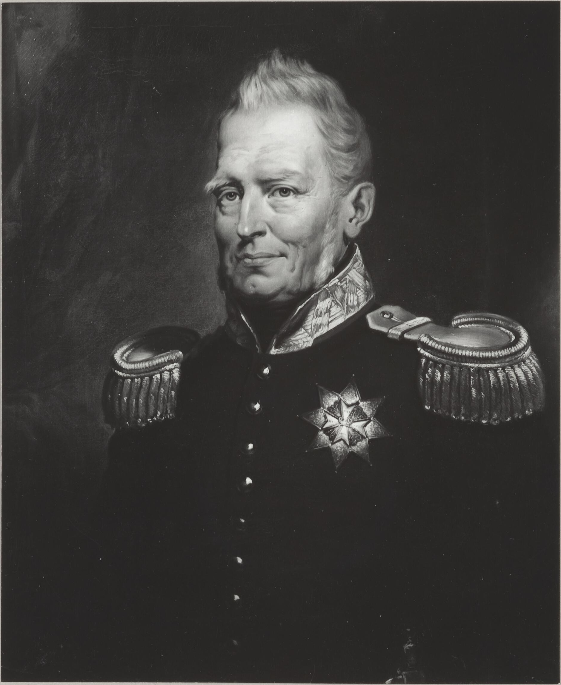 Portret van Willem I, koning der Nederlanden. oil on canvasmedium QS:P186,Q296955;P186,Q12321255,P518,Q861259. Height: 85 cm (33.4 ″); Width: 71 cm (27.9 ″) dimensions QS:P2048,85U174728;P2049,71U174728. Amsterdam, Rijksmuseum Amsterdam. vanaf 1950 tijdelijk onder beheer geweest van de Dienst voor 's Rijks Verspreide Kunstvoorwerpen (nu RCE).